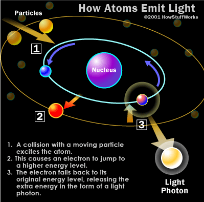 Emitimi i drites nga atomet